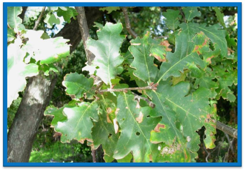 Die Blätter sind einfach, oval grün mit gezackten Kanten, bis zu 15 cm lang.